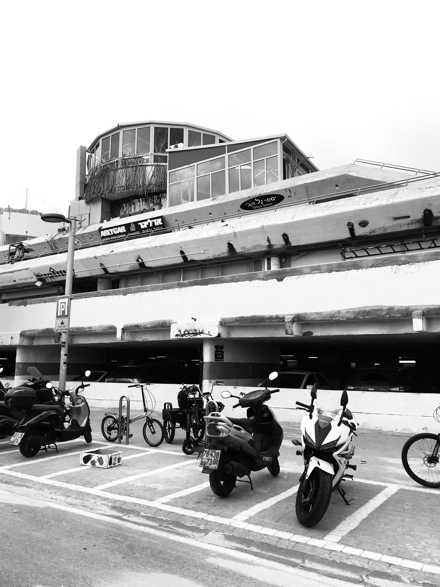 יריד המזרח חניית אופנועים ואופניים ביום חורף סגרירי